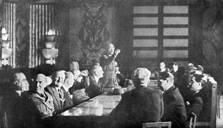 Insediamento del governo Badoglio a Salerno (22 aprile 1944)